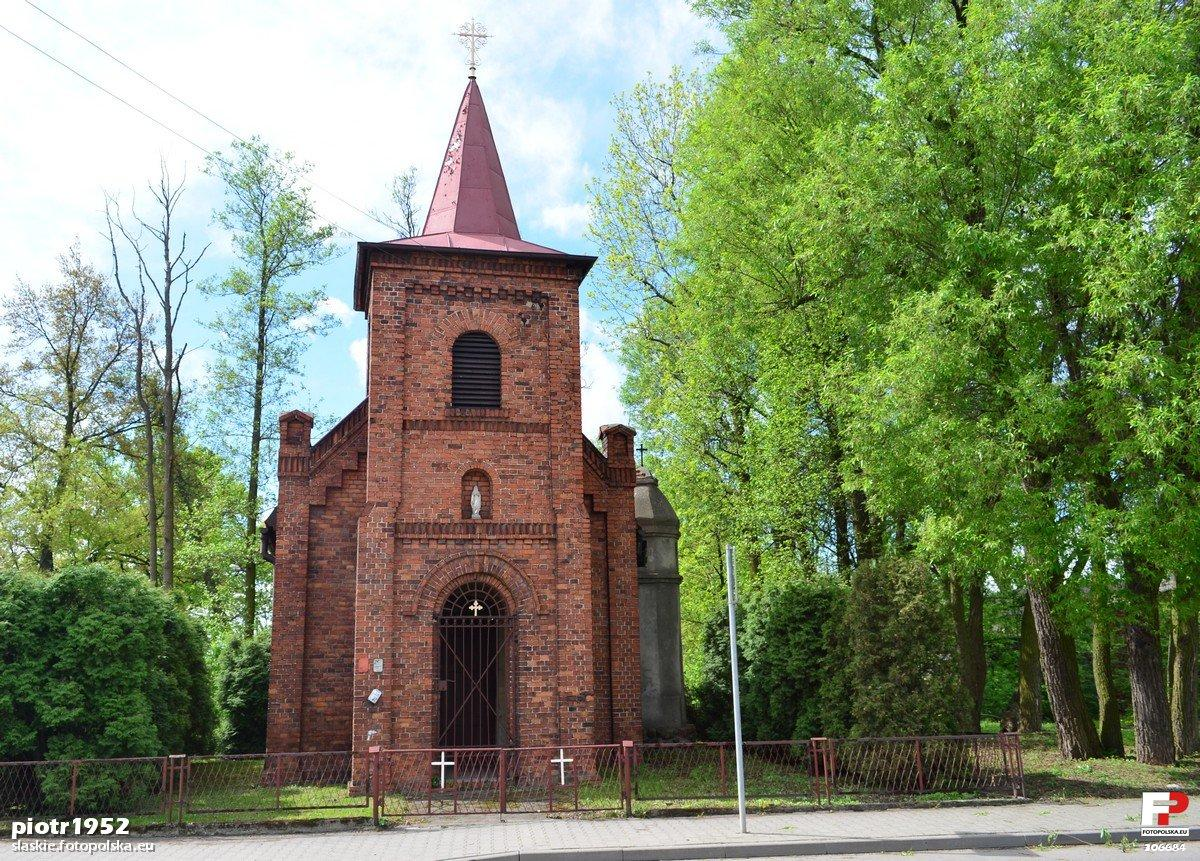 Kapliczka ul. Elsnera